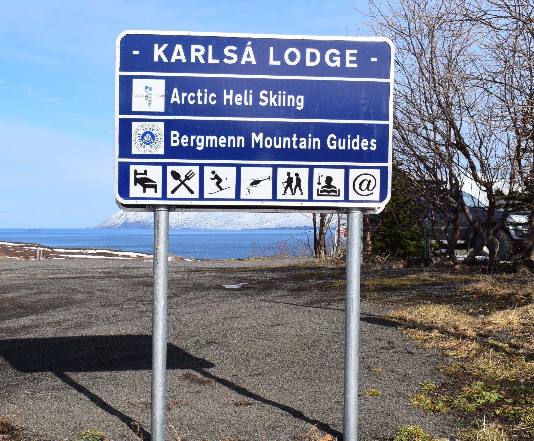 Skilti við bæinn Karlsá utan Dalvíkur